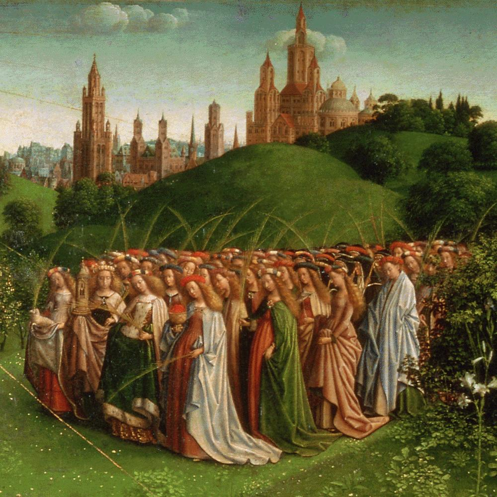 retable de l'Agneau mystique detail